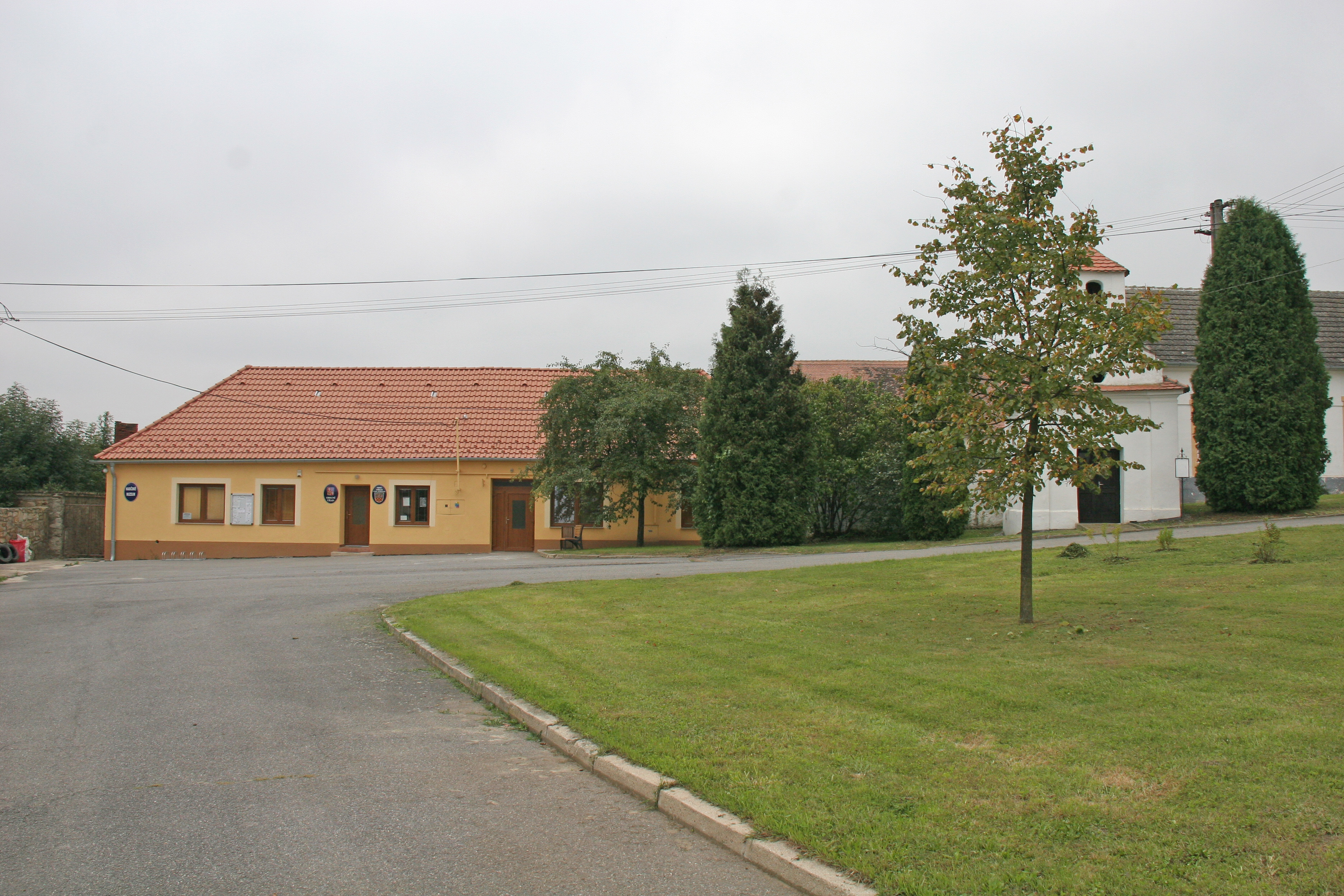 Jiřice u Moravských Budějovic obecní úřad